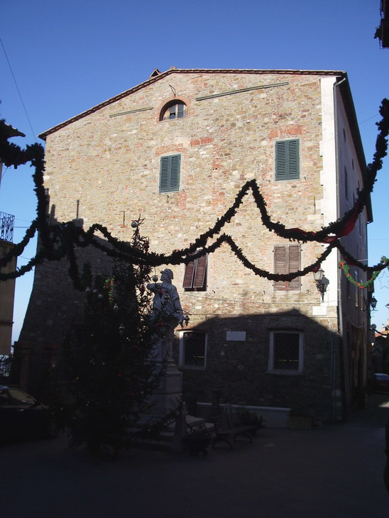 Il Palazzo del Conte a Scarlino (prospetto corto sulla piazza)